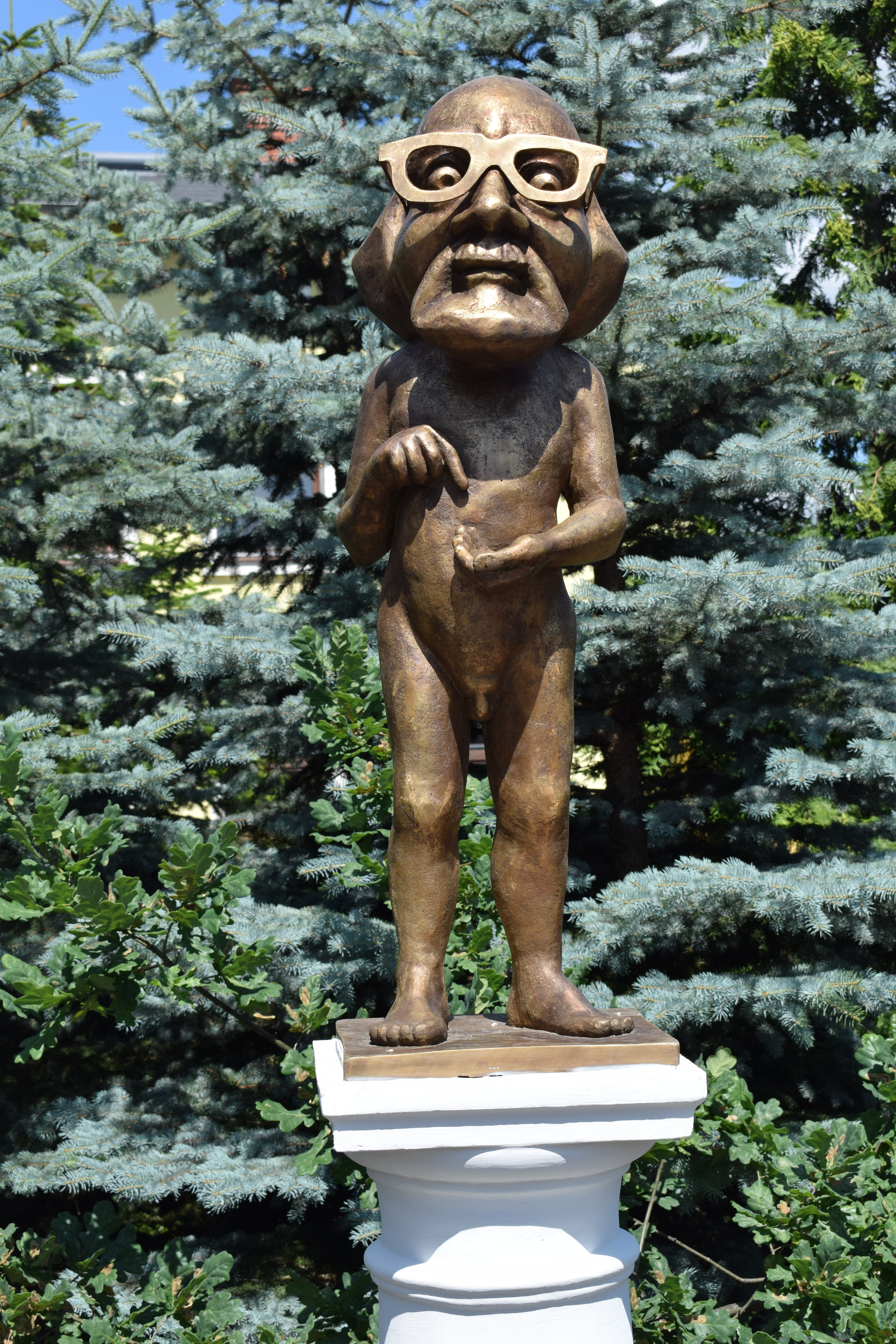 Obywatel Włapko - rzeźba autorstwa Wiesława Adamskiego odlana w brązie w Pracowni Rzeźbiarskiej Romualda Wiśniewskiego, symbolizująca skorumpowanego urzędnika, wystawiona na stałe w przestrzeni publicznej w formie pomnika.